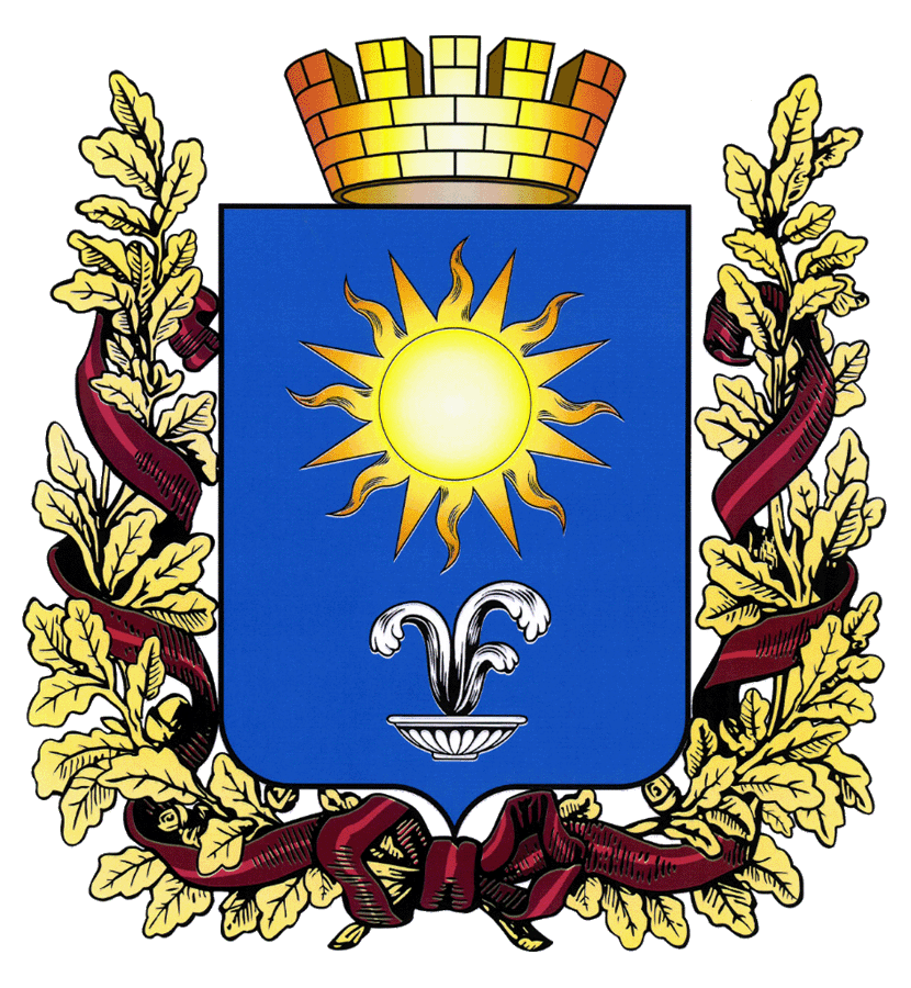 Герб города Кисловодска Ставропольского края, утверждённый Решением Думы города-курорта Кисловодска от 27 июля 2012 года № 121-412 «Об утверждении официальных символов городского округа города-курорта Кисловодска»